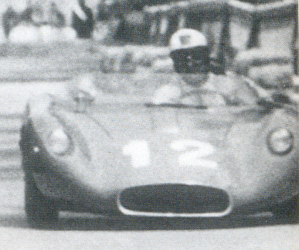 Bandini 1000 a motore posteriore. Teodoro Zeccoli foto tratta dal libro: Bandini (storia della vita e automobili di Ilario Bandini)